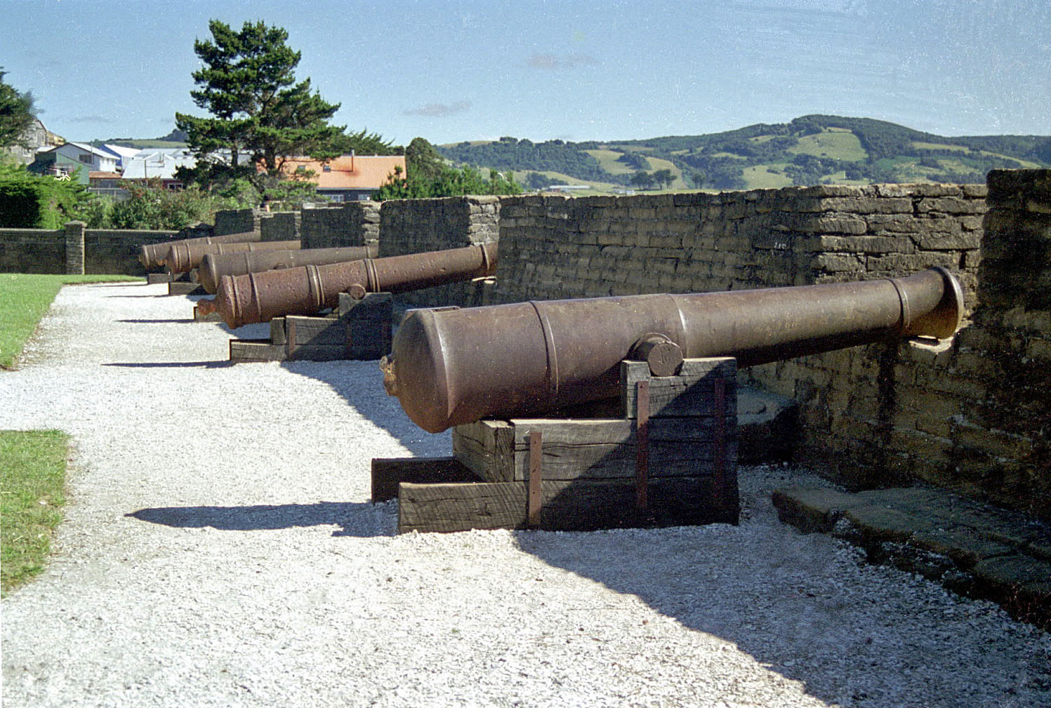 Foto del Fuerte San Antonio, Ancud, Chiloé, Chile